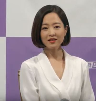 5월 3일 오후 서울시 강남구 임피리얼 팰리스 서울에서 tvN 새 월화드라마 '어비스 : 영혼 소생 구슬' 제작발표회가 열렸다.